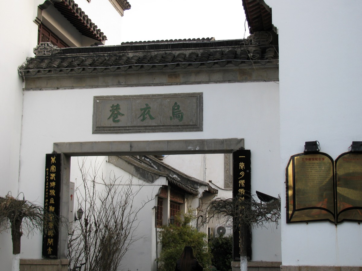 中文（中国大陆）: 乌衣巷口。